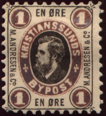 Почтовая марка местной почты Андресена в Кристиансунне (Норвегия) с портретом М. Андресена, 1879